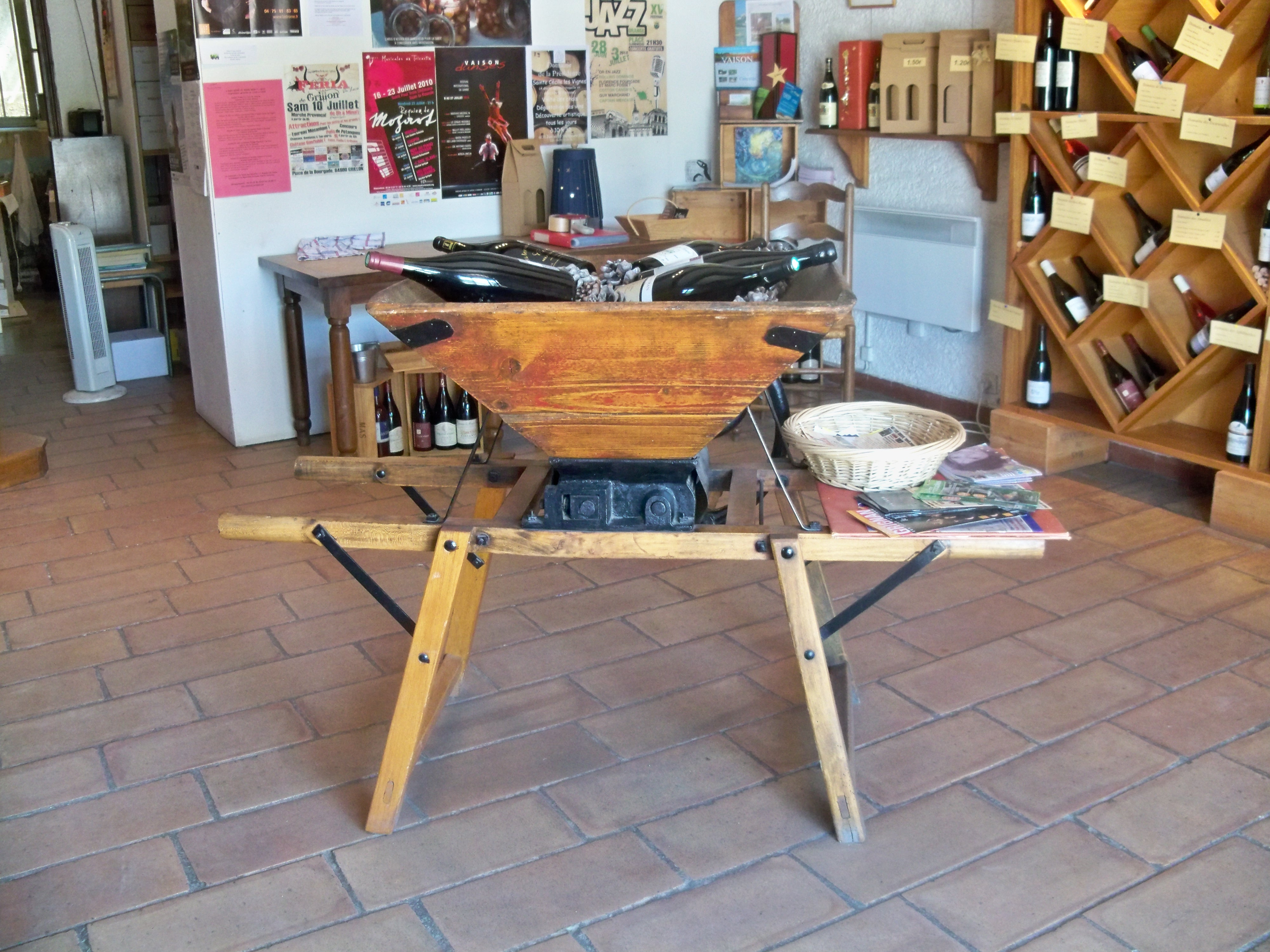 Cave de Cairanne, Vaucluse